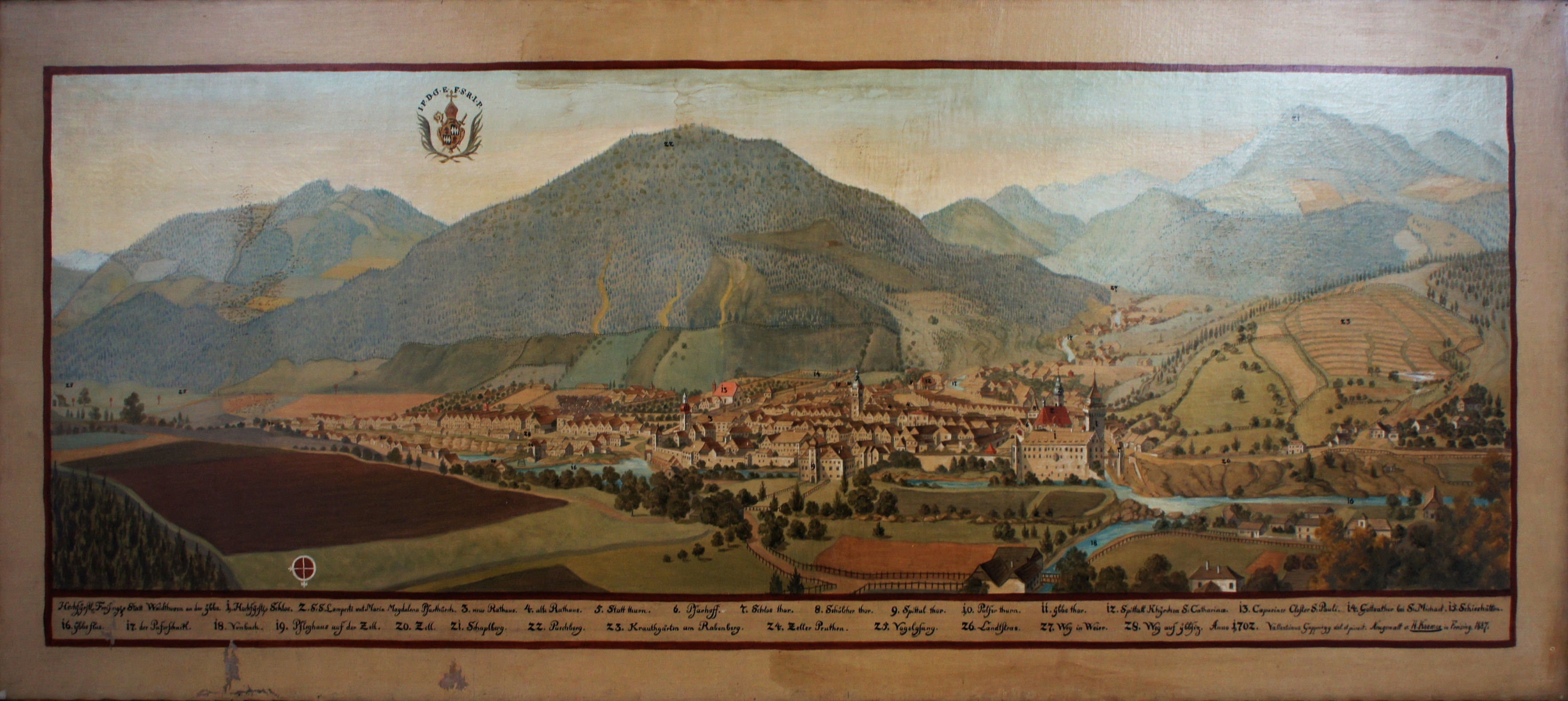 Gemälde aus einer Serie mit Darstellungen von Besitztümern des Hochstifts Freising im Fürstengang zwischen Fürstbischöflicher Residenz und Freisinger Dom.